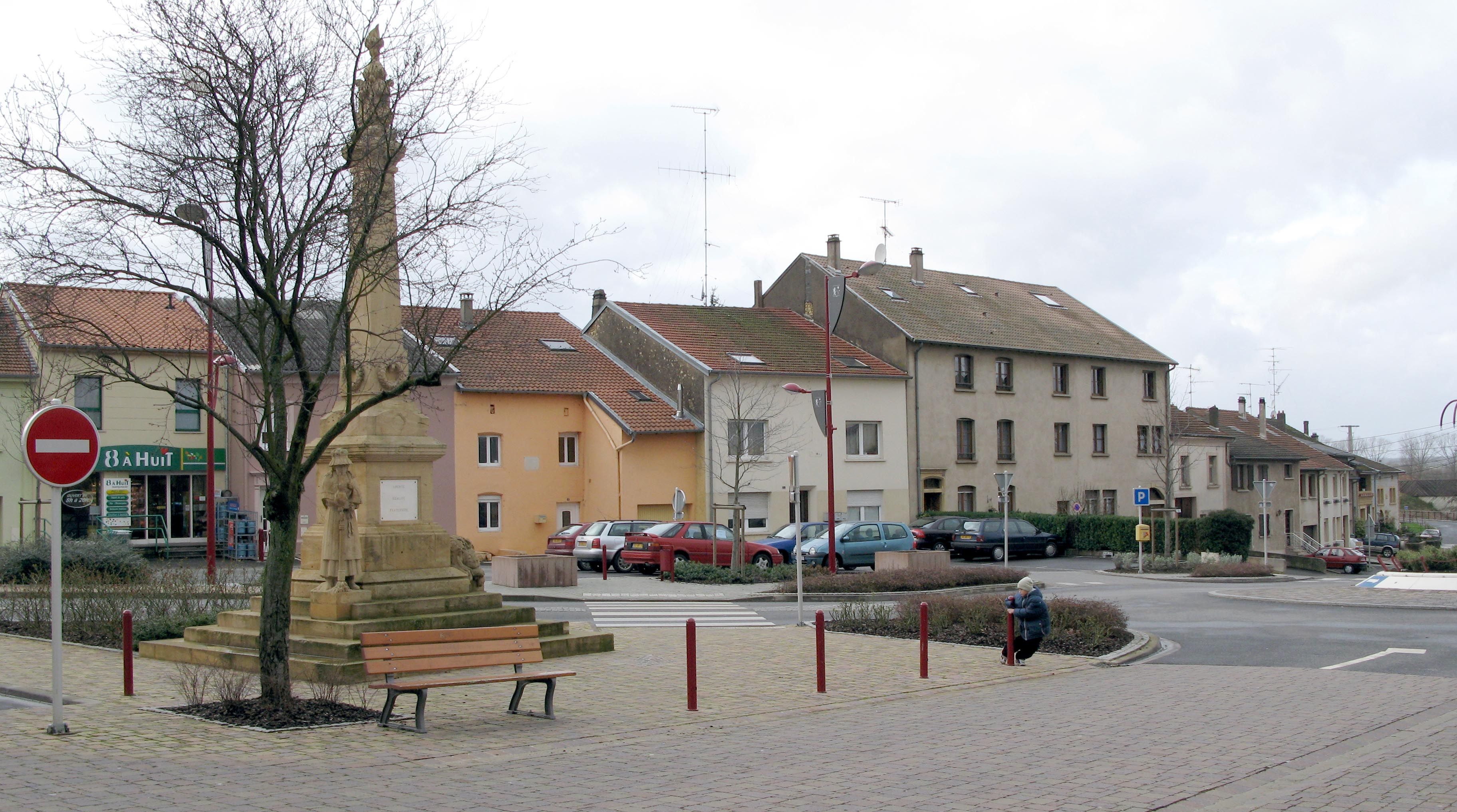 Koenigsmacker Plaz.